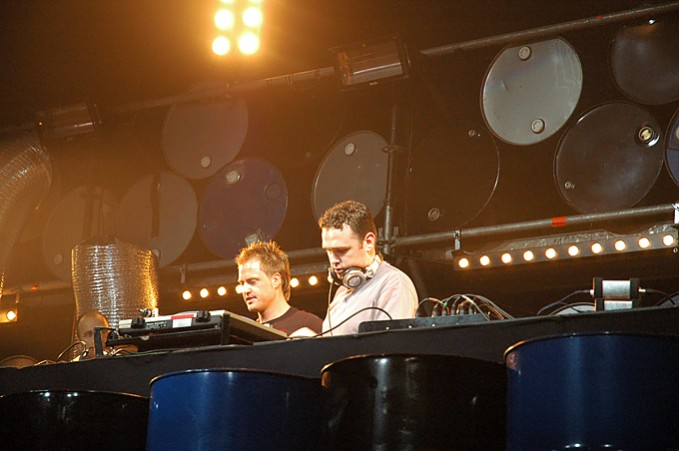 Le groupe musical gabber Endymion à Decibel 2005.